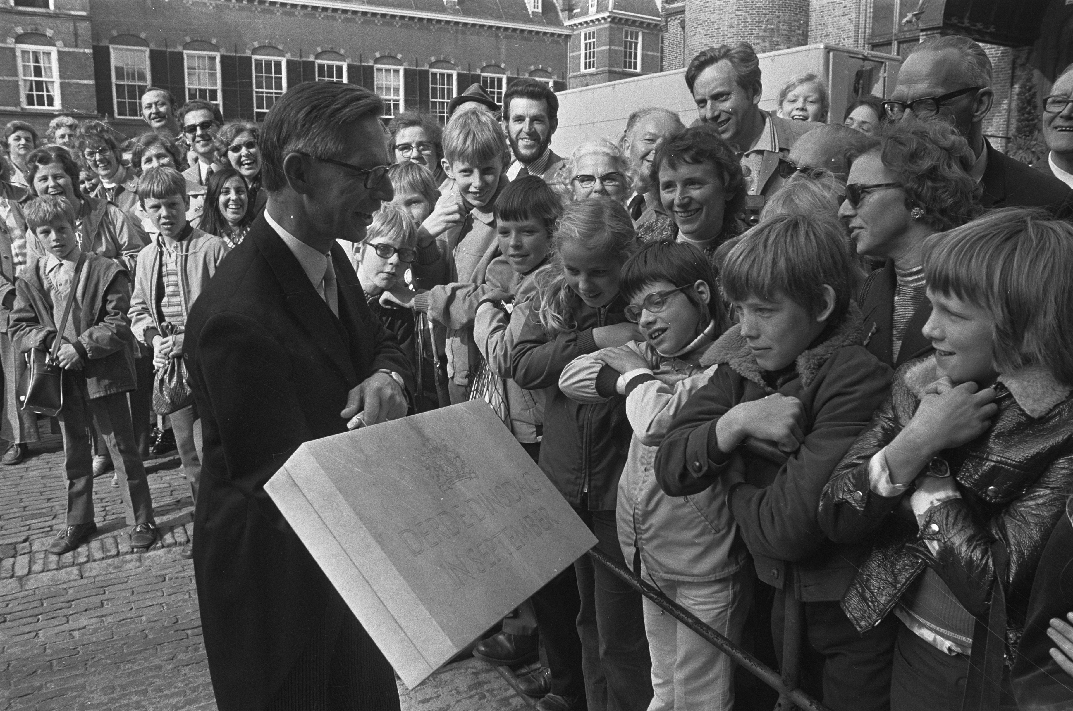 Collectie / Archief : Fotocollectie Anefo Reportage / Serie : Prinsjesdag 1972 Beschrijving : Prinsjesdag 1972; minister van Financien Nelissen laat op het Binnehof het koffertje met de Miljoenennota zien aan publiek Datum : 19 september 1972 Locatie : Den Haag, Zuid-Holland Trefwoorden : kinderen, ministers, overheidsbegrotingen, politiek, publiek Persoonsnaam : Nelissen, R.J. Fotograaf : Bert Verhoeff / Anefo Auteursrechthebbende : Nationaal Archief Materiaalsoort : Negatief (zwart/wit) Nummer archiefinventaris : bekijk toegang 2.24.01.05 Bestanddeelnummer : 925-8914